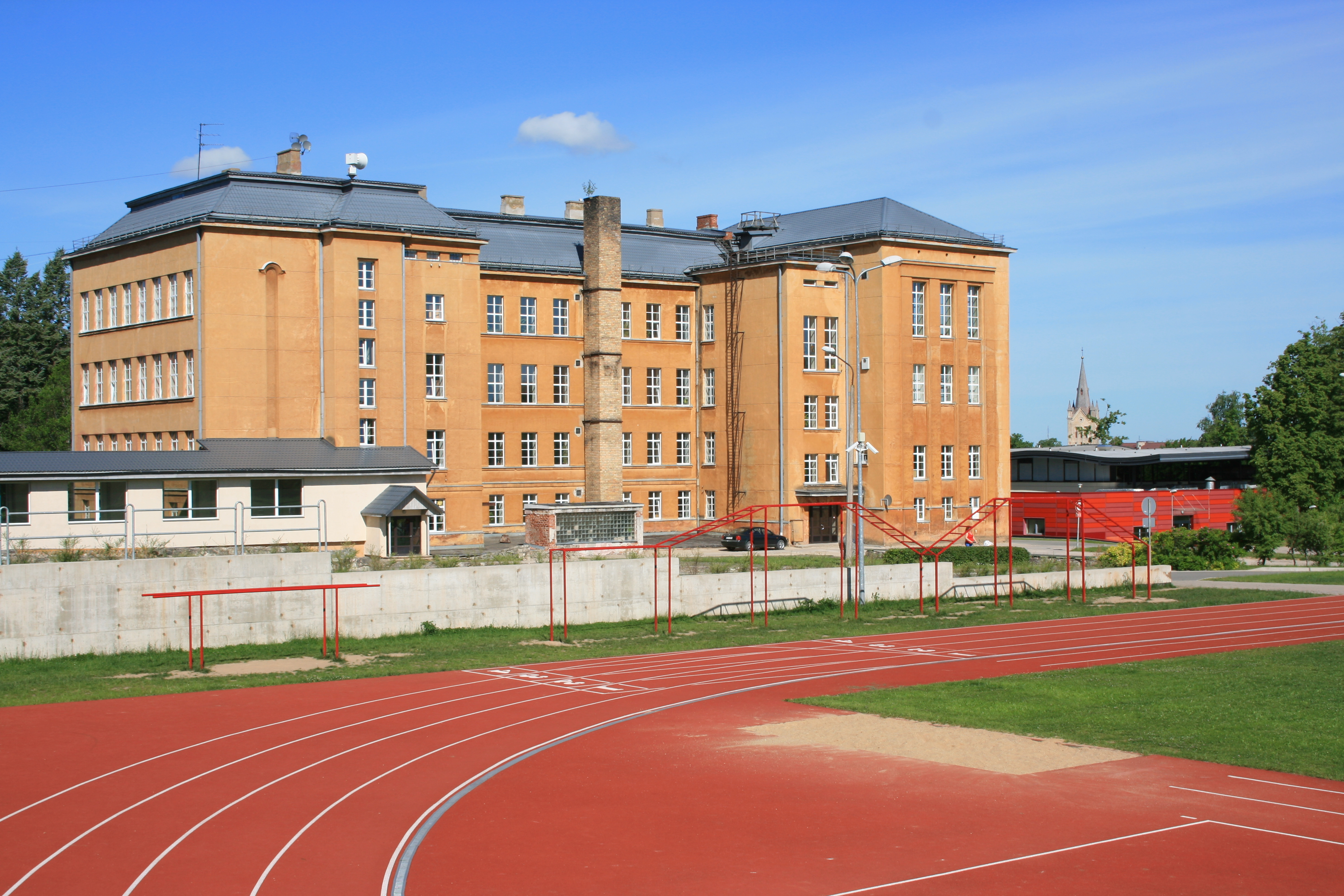 Cēsu Valsts ģimnāzija